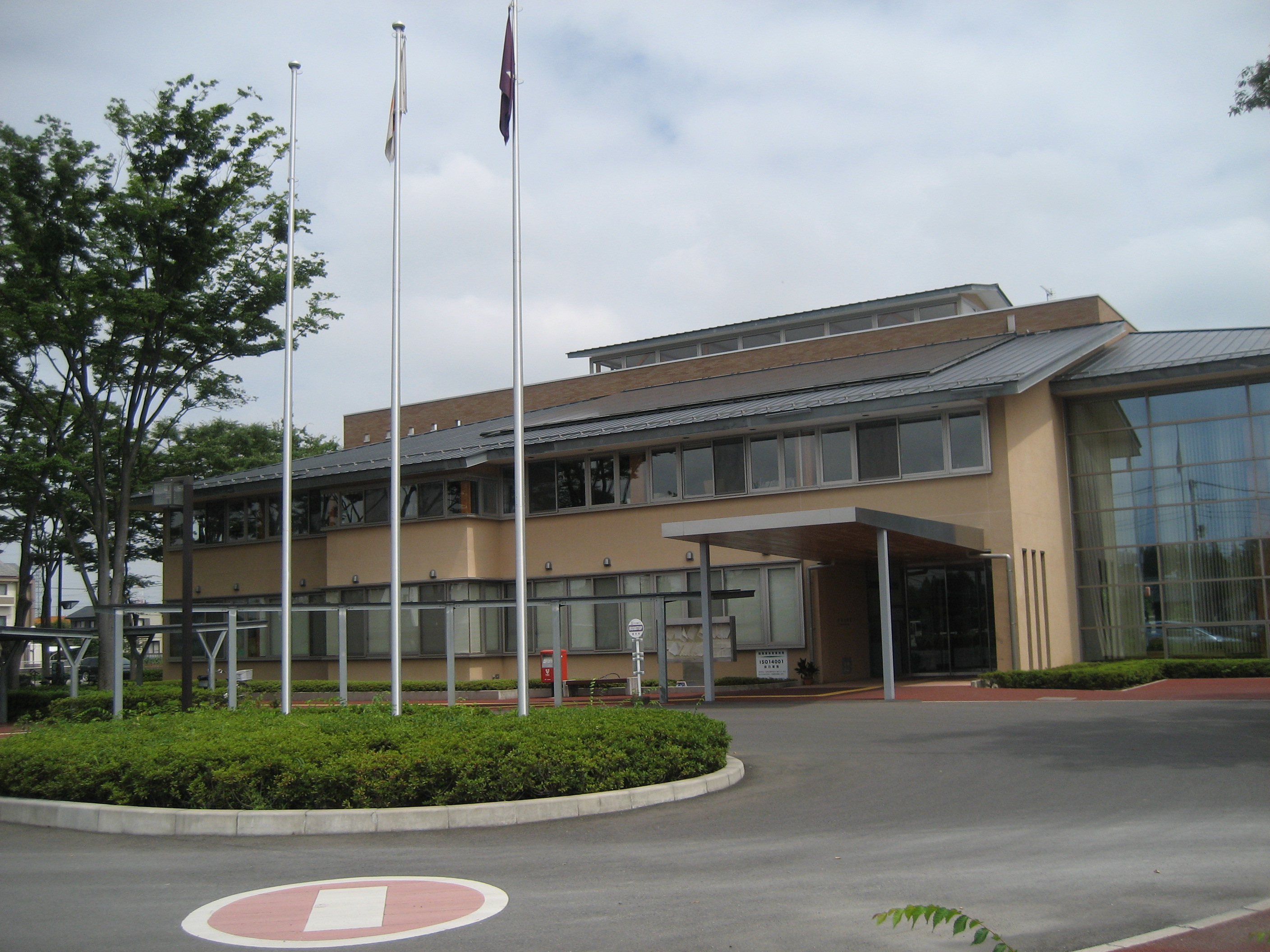 埼玉県宮代町役場庁舎２